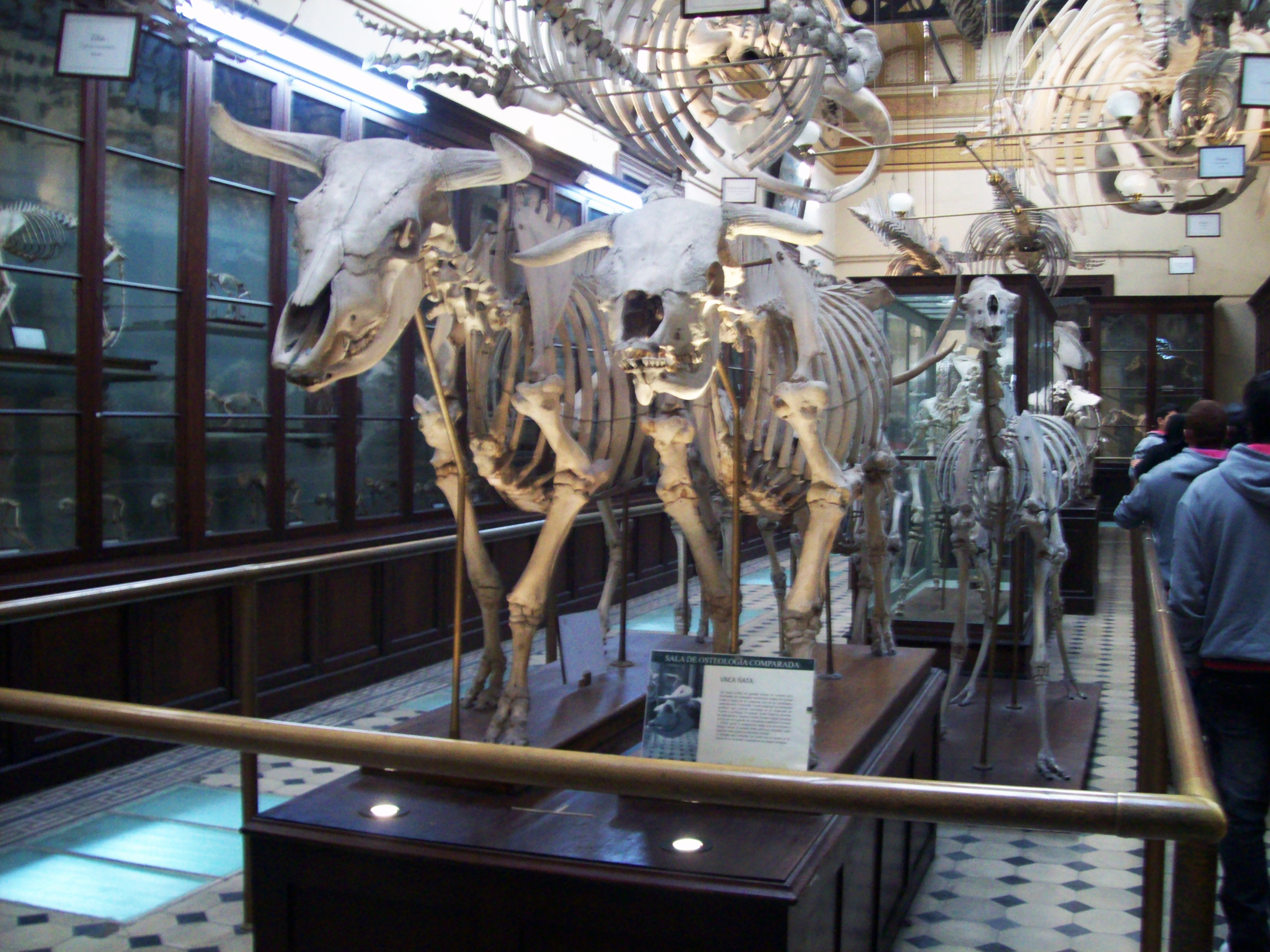 Sala de osteología comparada del Museo de La Plata, esqueletos de vaca ñata.